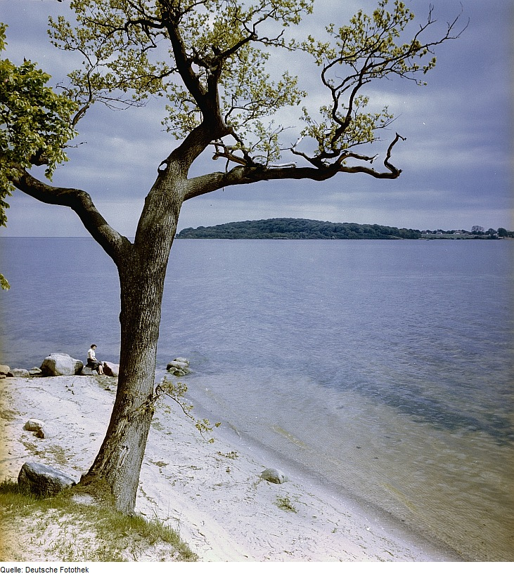 Original image description from the Deutsche Fotothek Blick zur Insel Vilm?